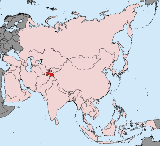 Karte Asiens, Tadschikistan hervorgehoben, selbst erstellt